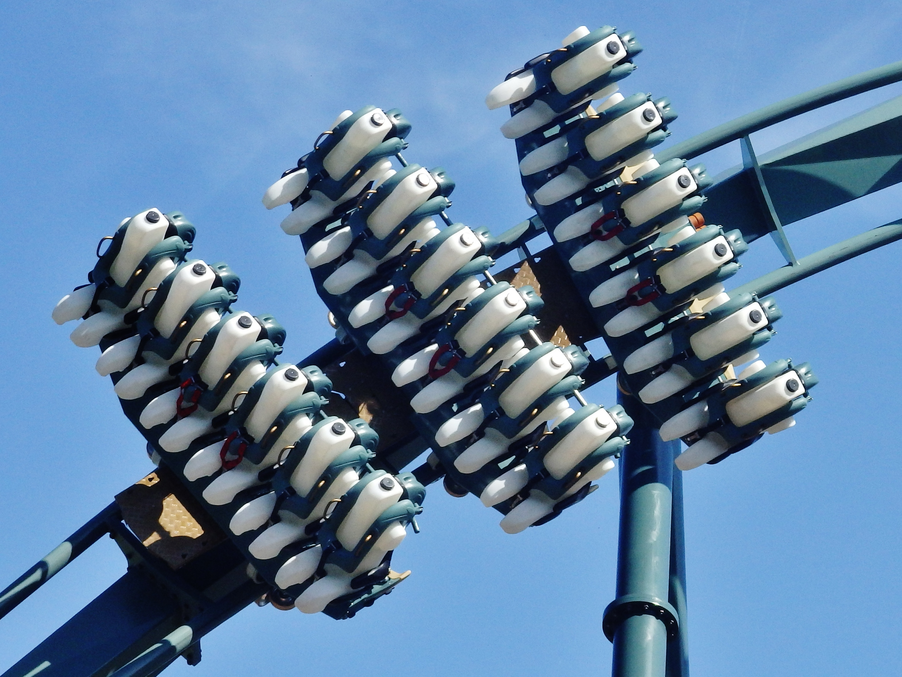 De bouw in mei